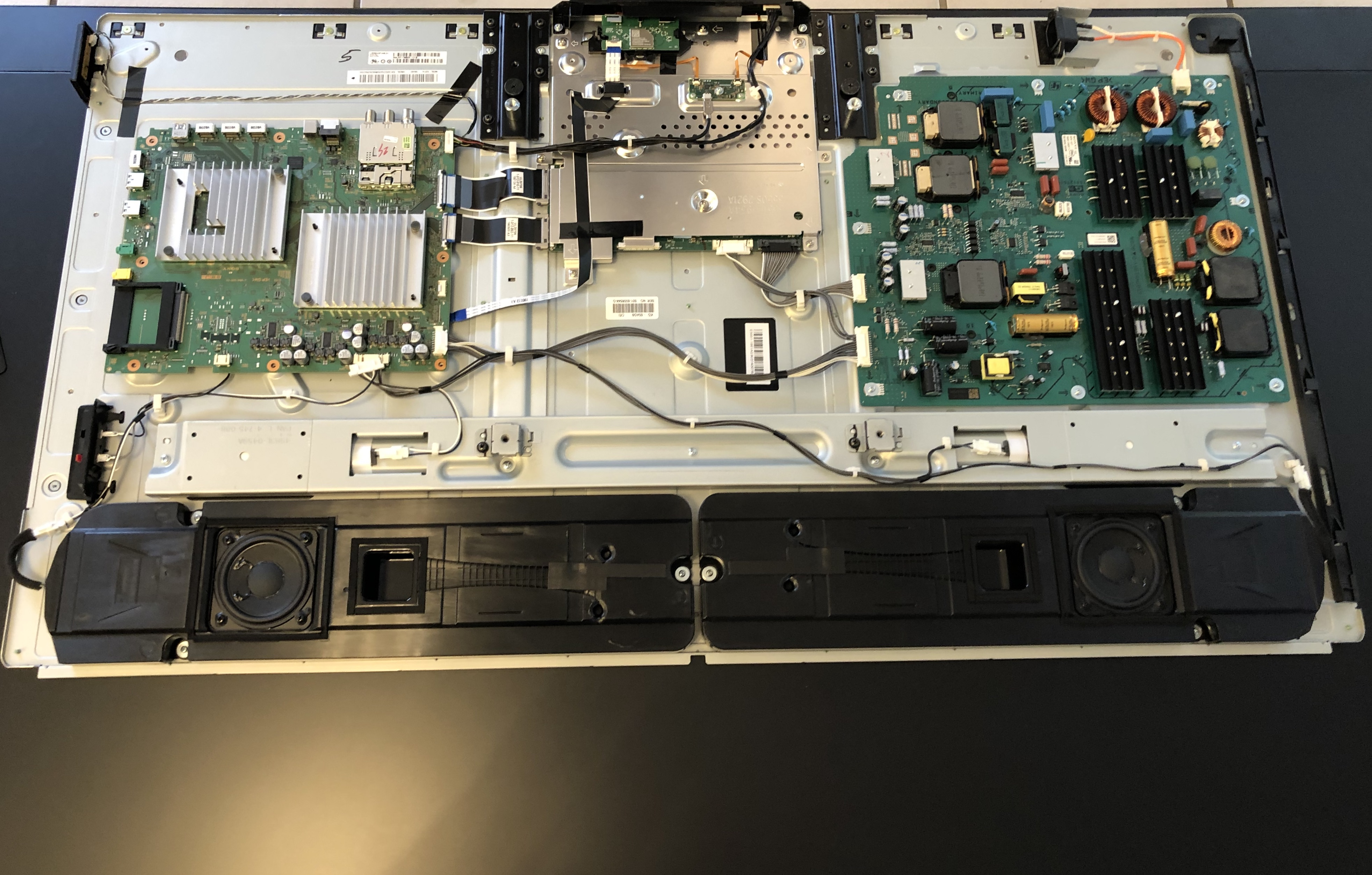 Innenleben des SONY Bravia KD 65AG9 Produktion 07/2019; 4K OLED, 65 Zoll Bildschirmdiagonale